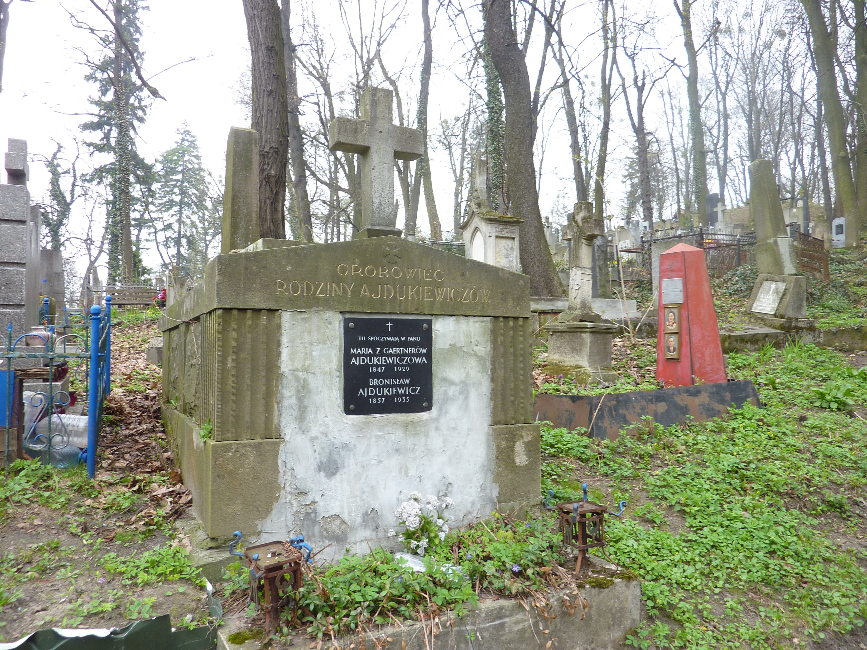 Grobowiec Ajdukiewiczów na cmentarzu Łyczakowskim we Lwowie, gdzie pochowani są rodzice Kazimierza Ajdukiewicza